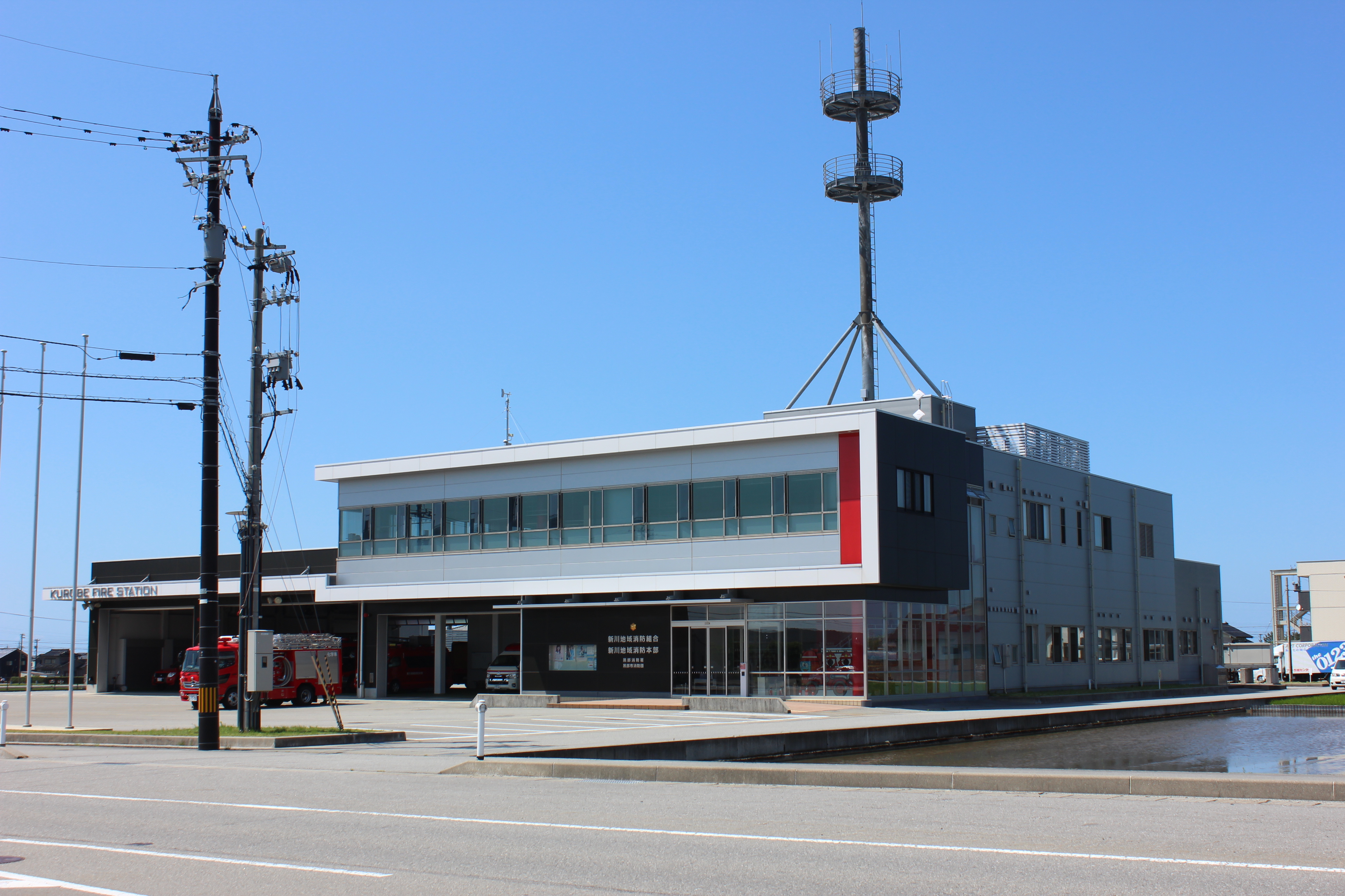 新川地域消防組合消防本部・黒部消防署（富山県黒部市） Canon EOS Kiss X5